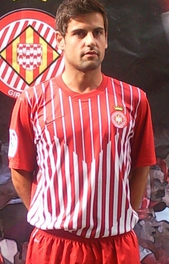 presentando la nueva camiseta del girona